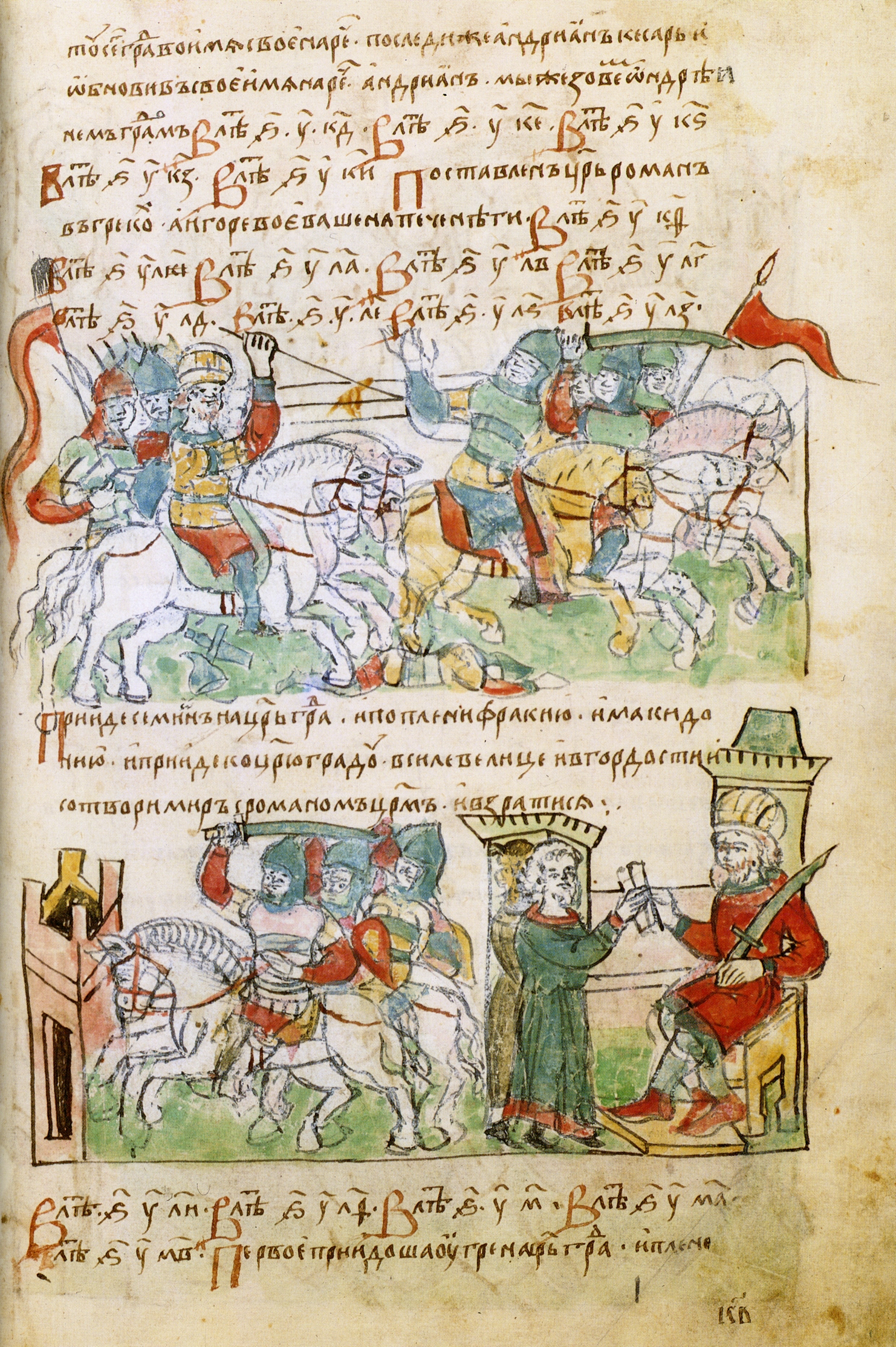 Радзивилловская летопись, л. 21r Миниатюры: Mиниатюра представляет битва болгарского царя Симеона с византийцами (914) или война Игоря с печенегами (наверху) Tекст из Радзивиловской летописи: "... а болгаре со грекы ступишася, и пересечени быша грекы. Симеон же приа град Ондрень ... а Игоре воеваше на печенеги ..." (см. также: Хроника Георгия Амартола; Истрин В. М.: Книгы временыя и образныя Георгия Мниха. Хроника Георгия Амартола в древнем славянорусском переводе. Т. 1. Текст, исслед. и словарь. Пг., 1920, стр. 545-546; Иванова Кл., Николова Св.: Тържество на Словото. Златният Век на Българската Книжнина. VI. Летописни творби: Георги Амаратол. Временник) Поход болгарского царя Симеона на Царыград (922-924) и заключение мира с императором Романом I (внизу) Tекст из Радзивиловской летописи: "... Прииде Семион на Царыград, и поплени Фракию и Макидонию, и прииде ко Царюграду в силе велице и в гордости, и сотвори мир с Романом царем ..." Литература: Кукушкина: Радзивиловская летопись. Текст. Исследование. Описание миниатюр, стр. 310